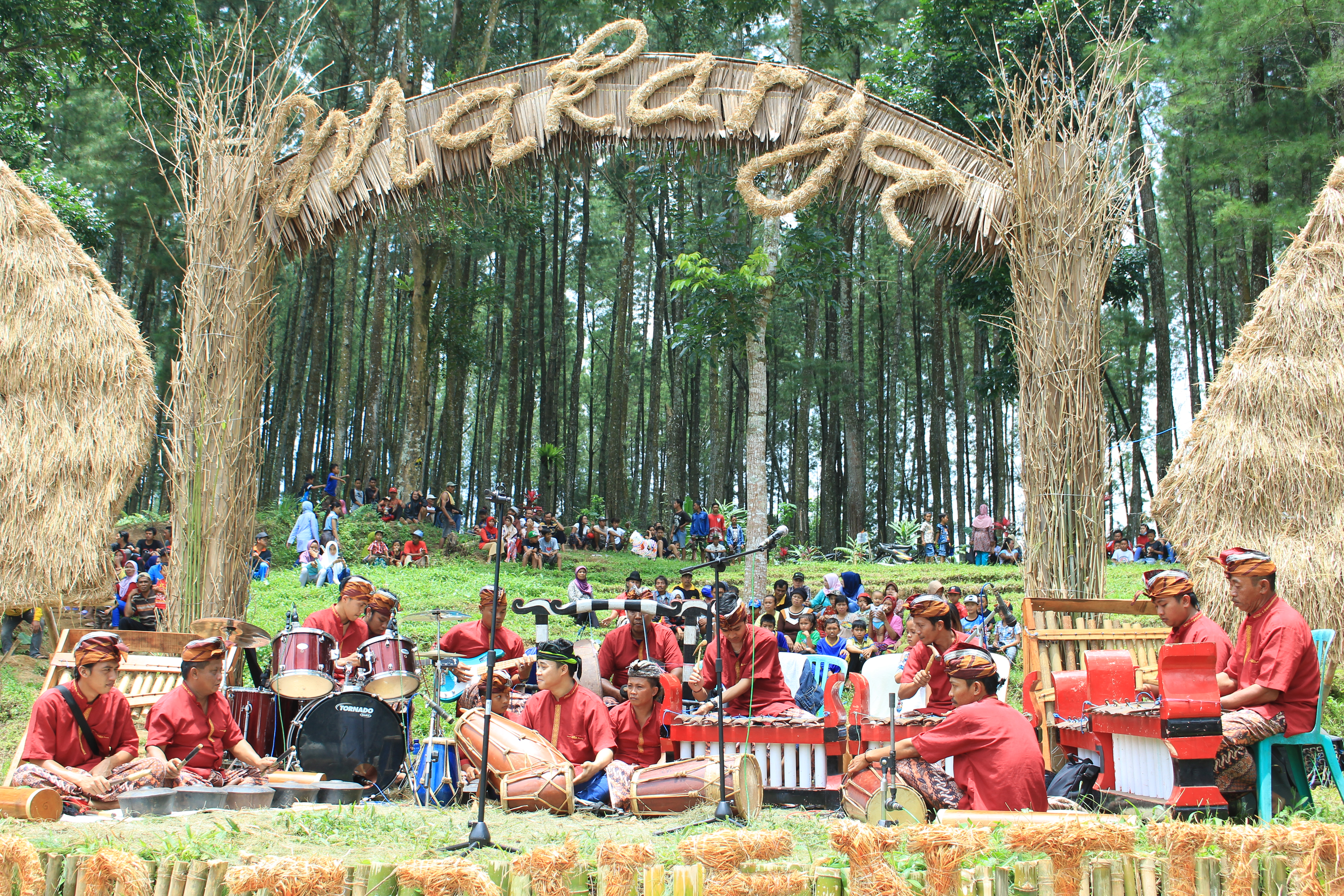 Pagelaran Makarya, pesta pagelaran seni budaya dan potensi masyarakat kaki raong yang digelar secara gotong royong dan mandiri oleh masyarakat Songgon